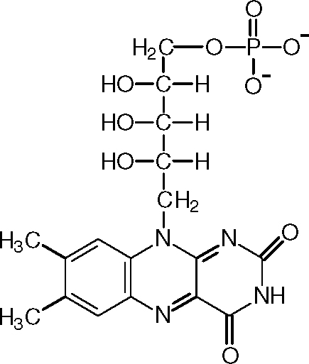 Флавин